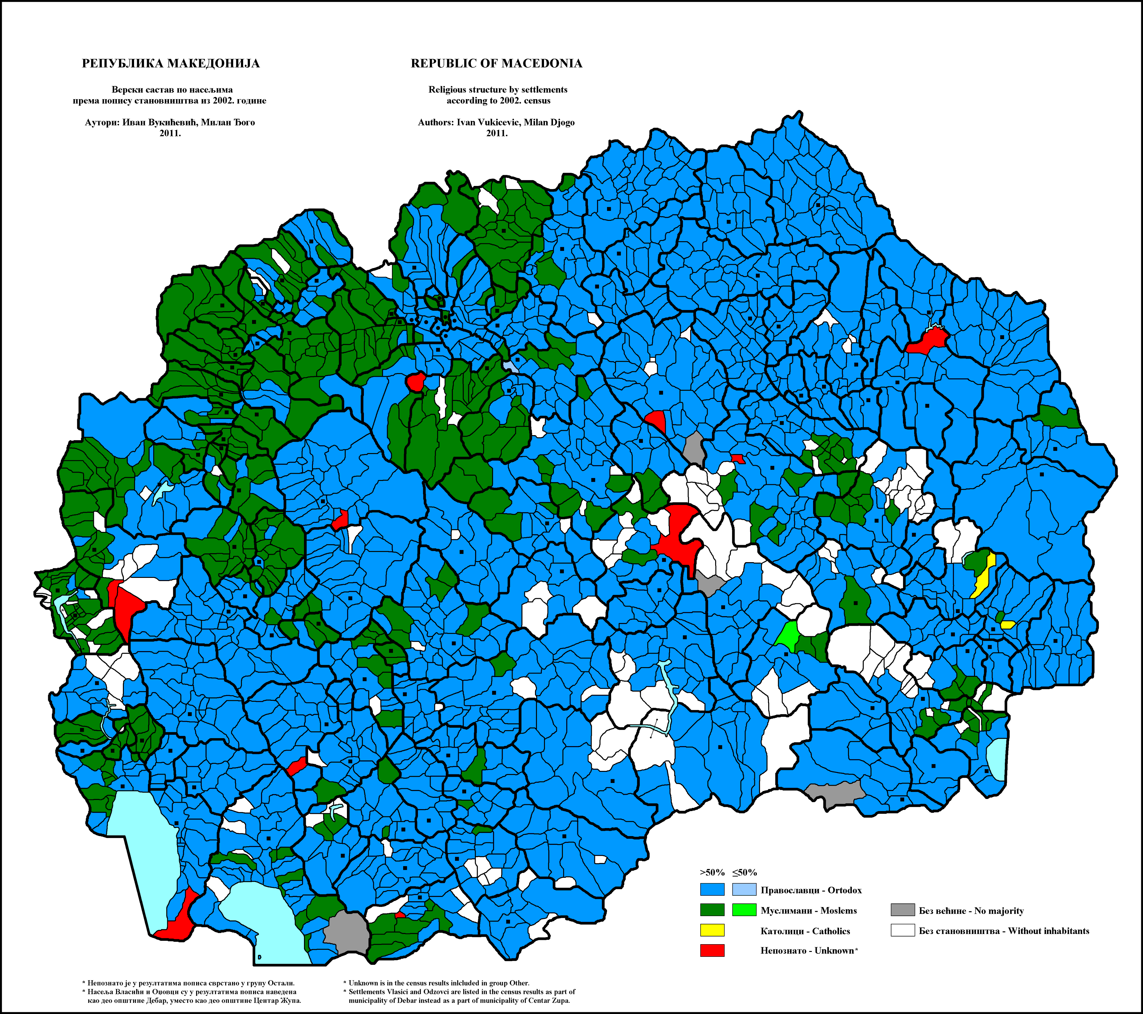 Верски састав Македоније по насељима 2002. године. Аутори: Иван Вукићевић - , Милан Ђого